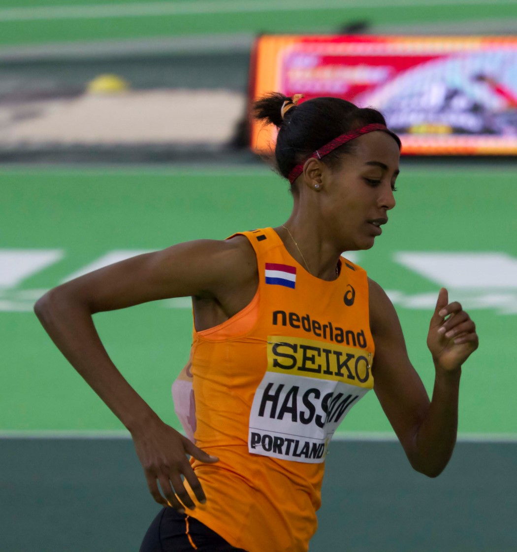 163 sifan hassan